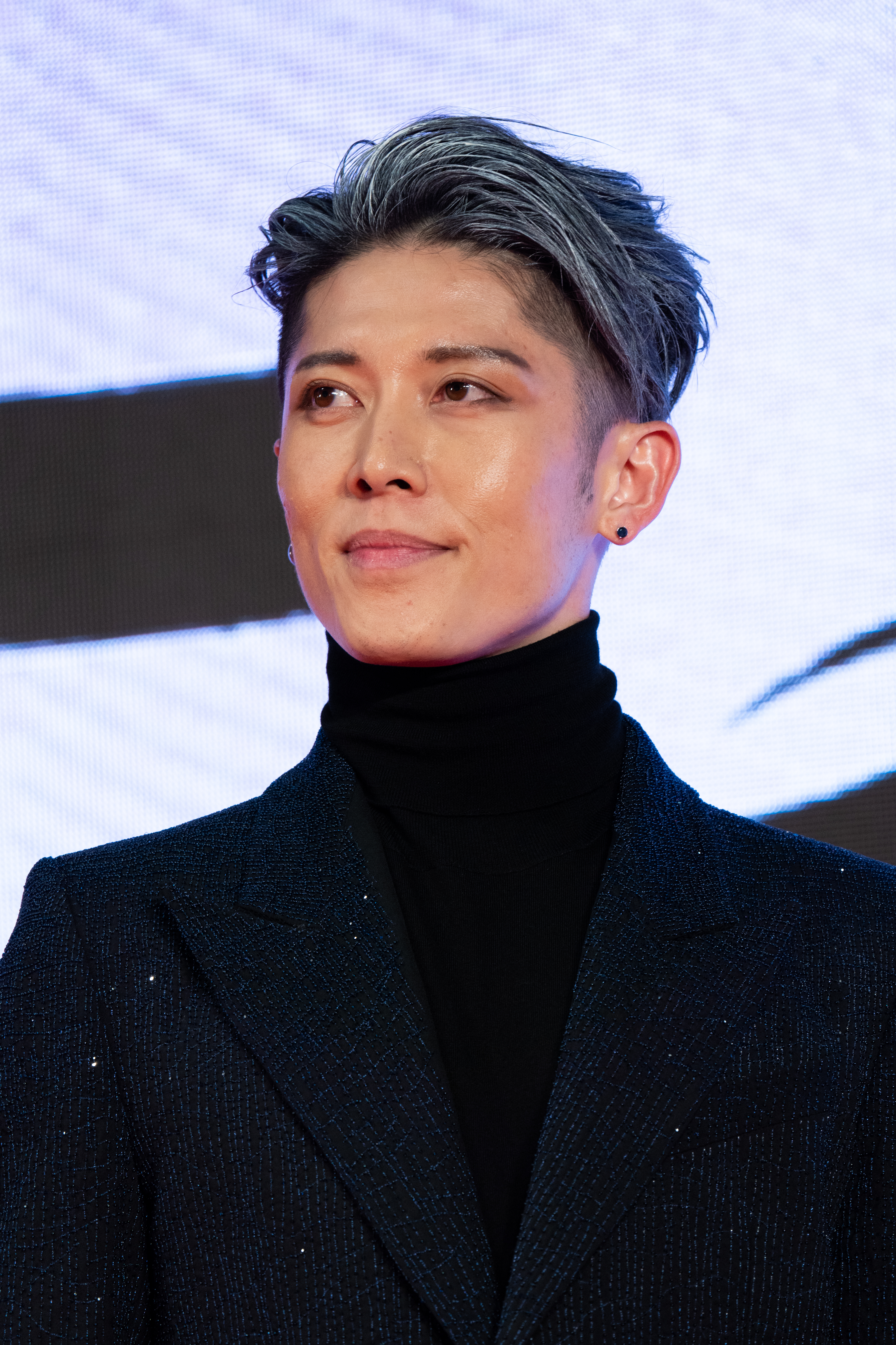 第32回 東京国際映画祭 オープニングセレモニー MIYAVI (アメリカン航空)